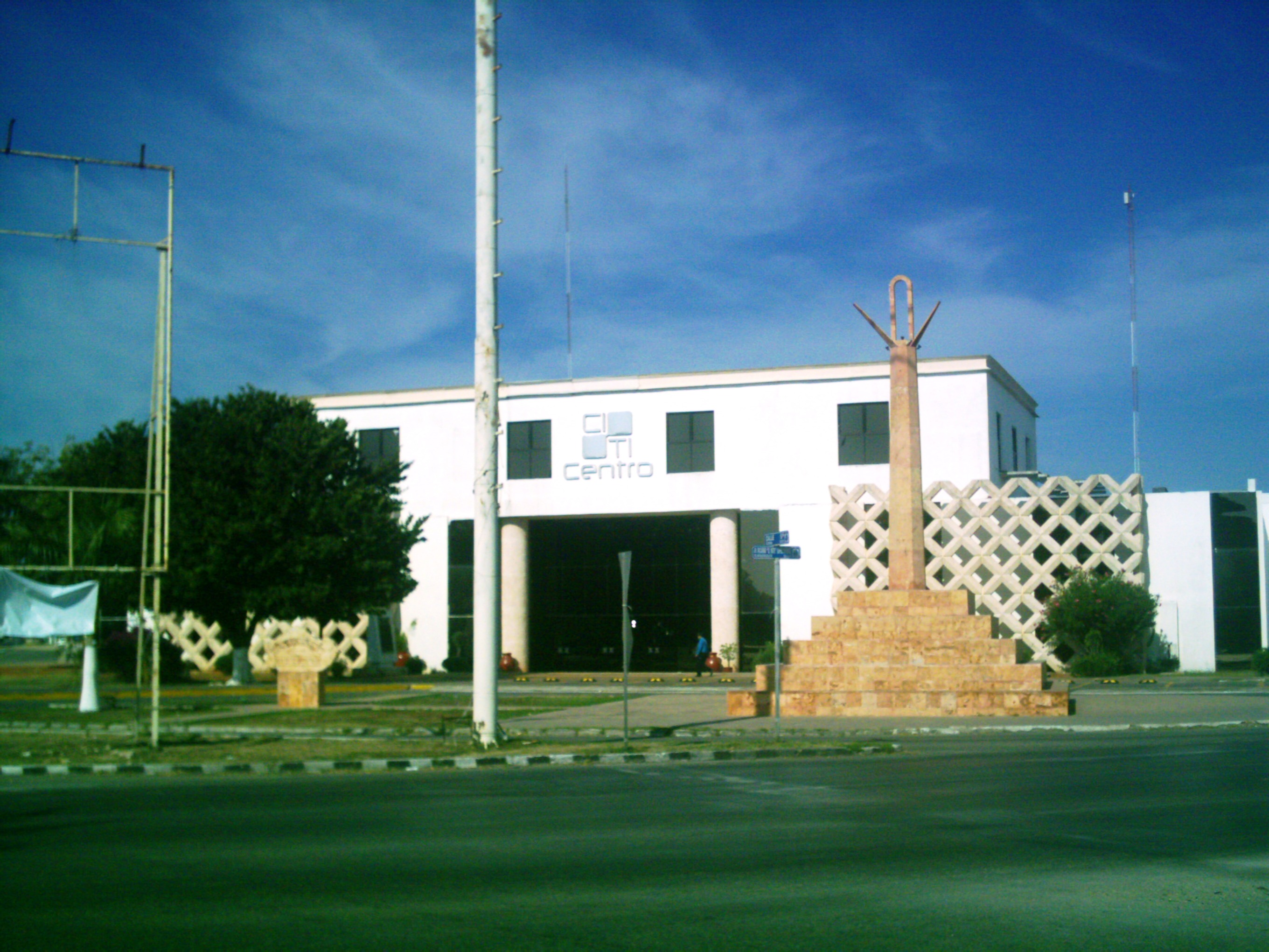 Monumento a la inmigracíon coreana en Yucatán.